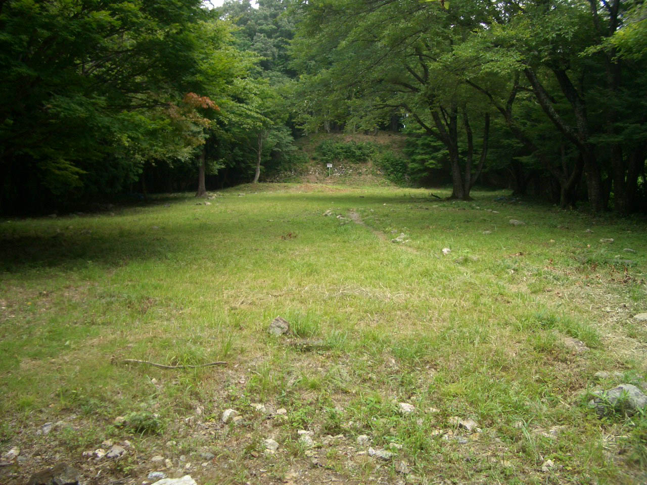 千畳敷曲輪